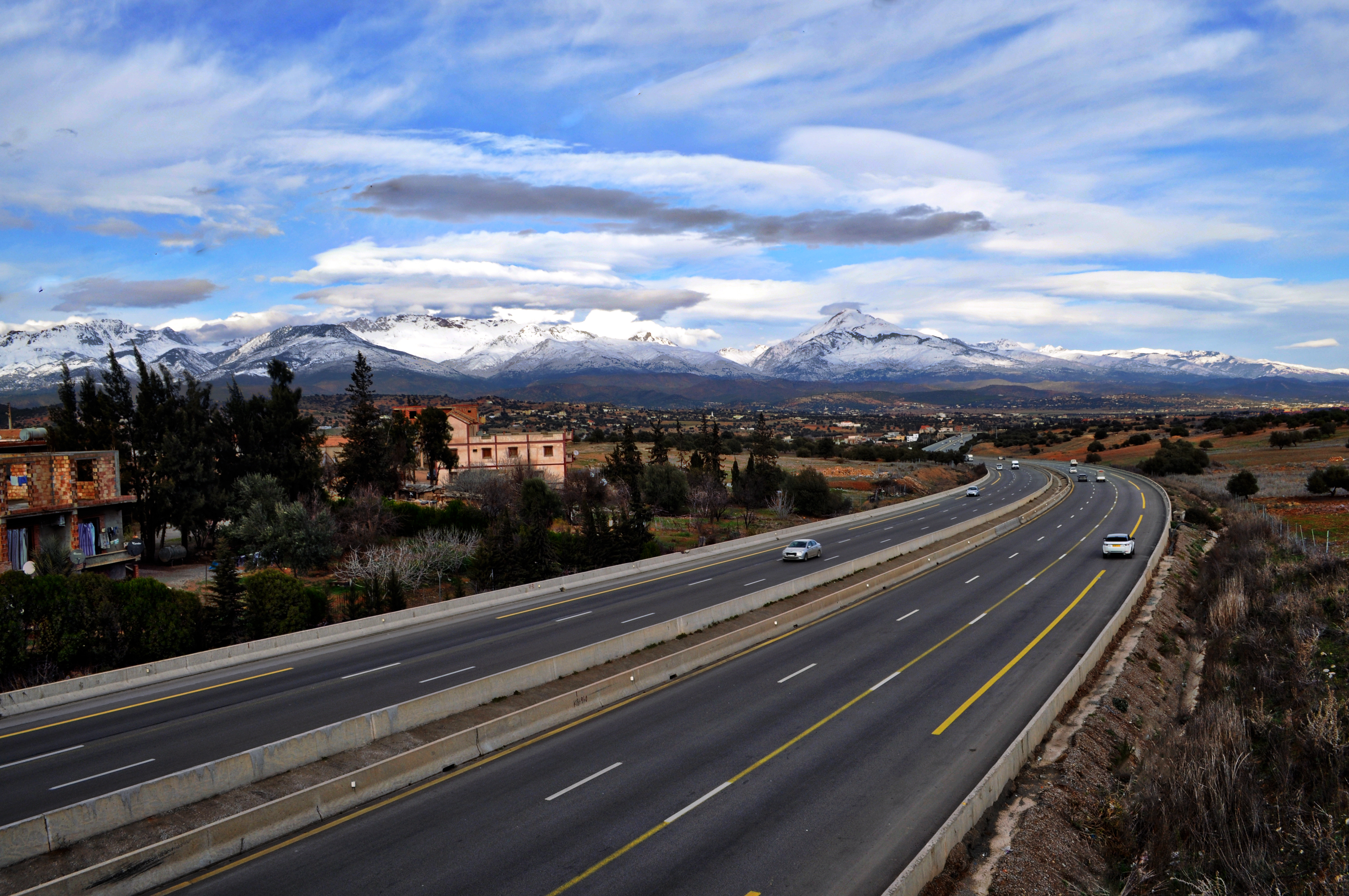 La vue la plus spectaculaire depuis l'autoroute Est Ouest, Bouira en Algérie